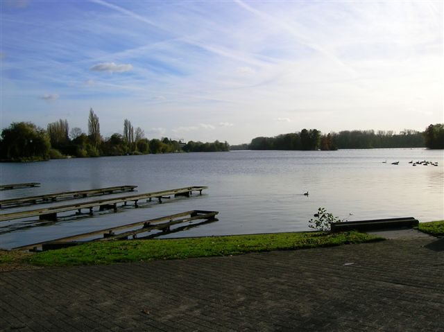 Zelf gemaakt op 12 november 2006